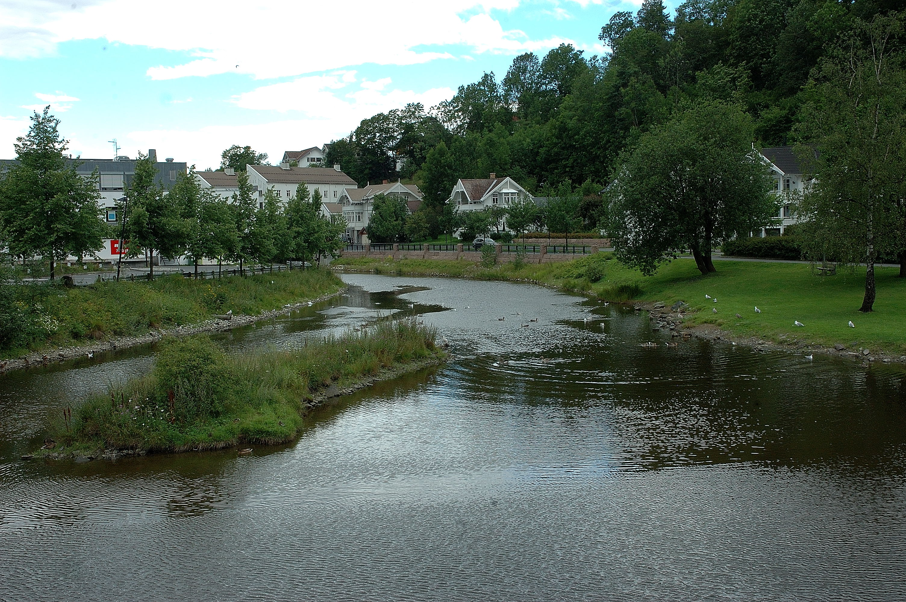 Rønneelva in Sandvika, Baerum, Norway Rønneelva i Sandvika, Bærum